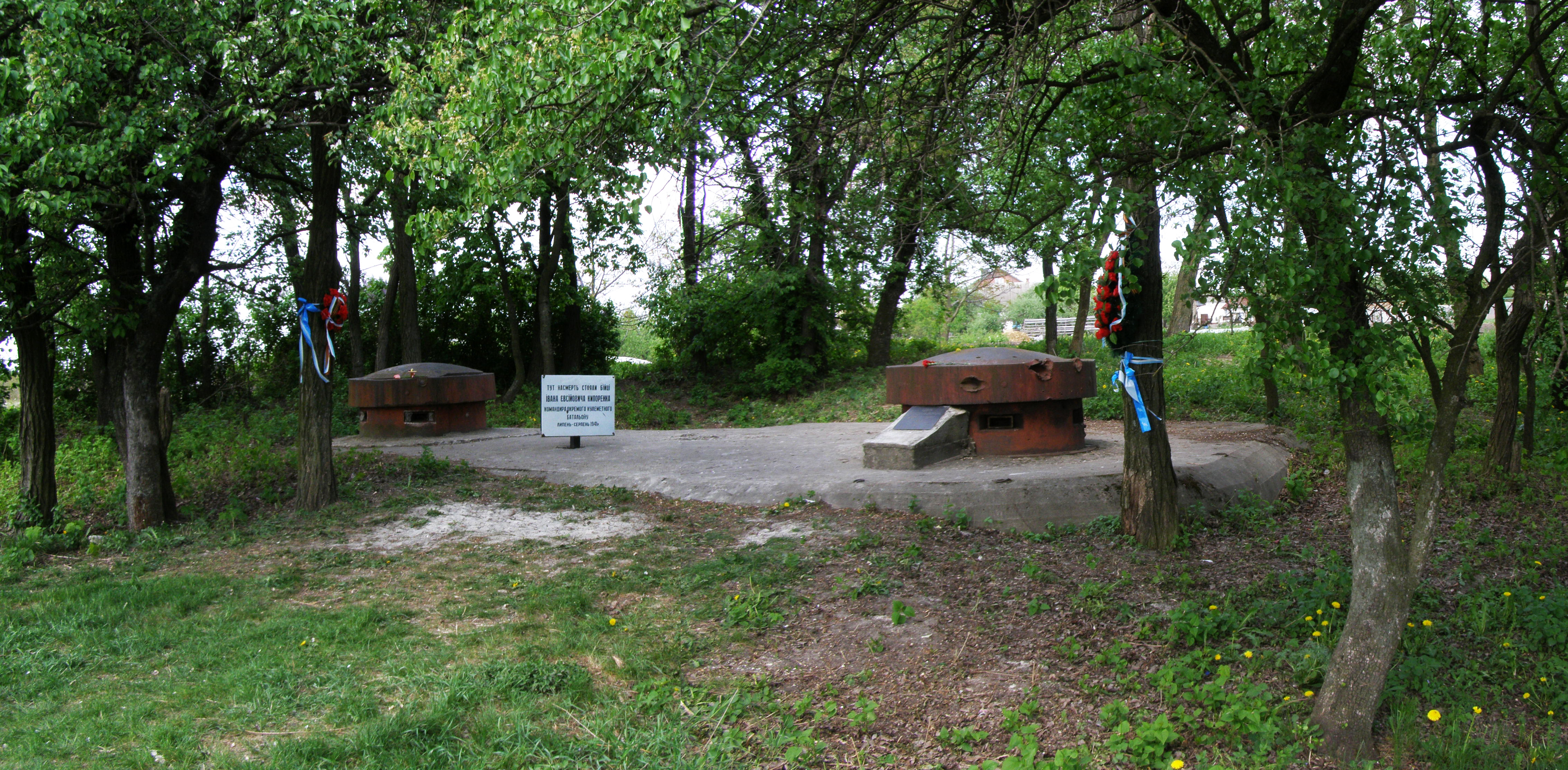 Дот 204